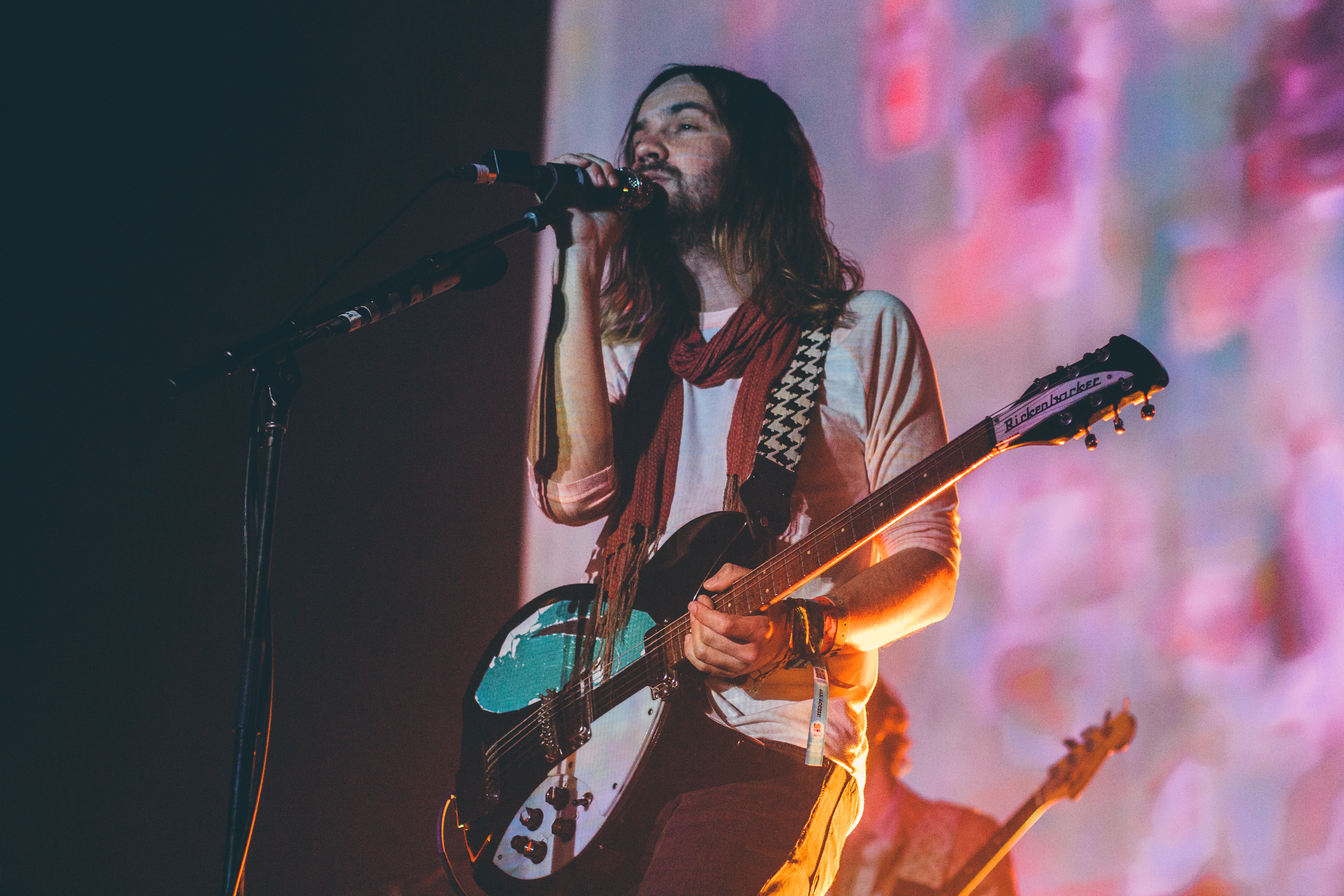 Tame_Impala-3724